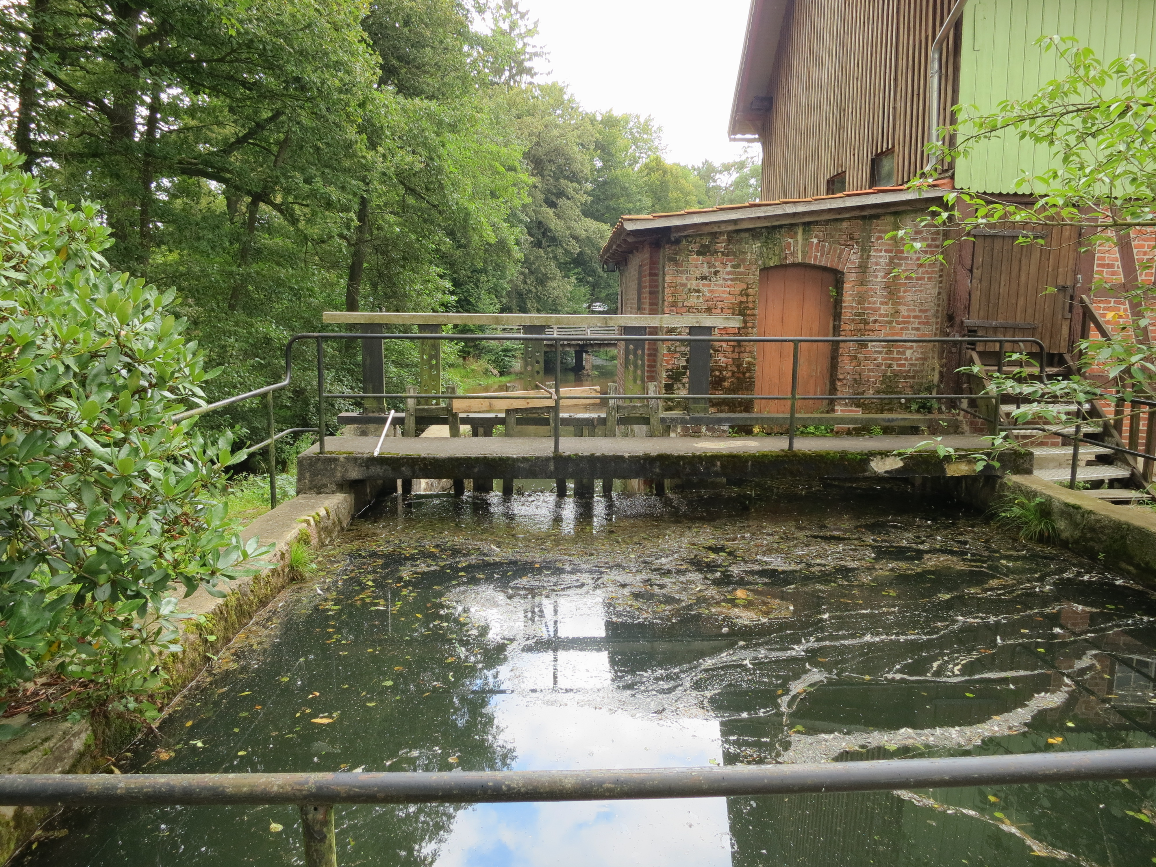 Die Sudermühle in Egestorf-Sudermühlen an der Schmalen Aue